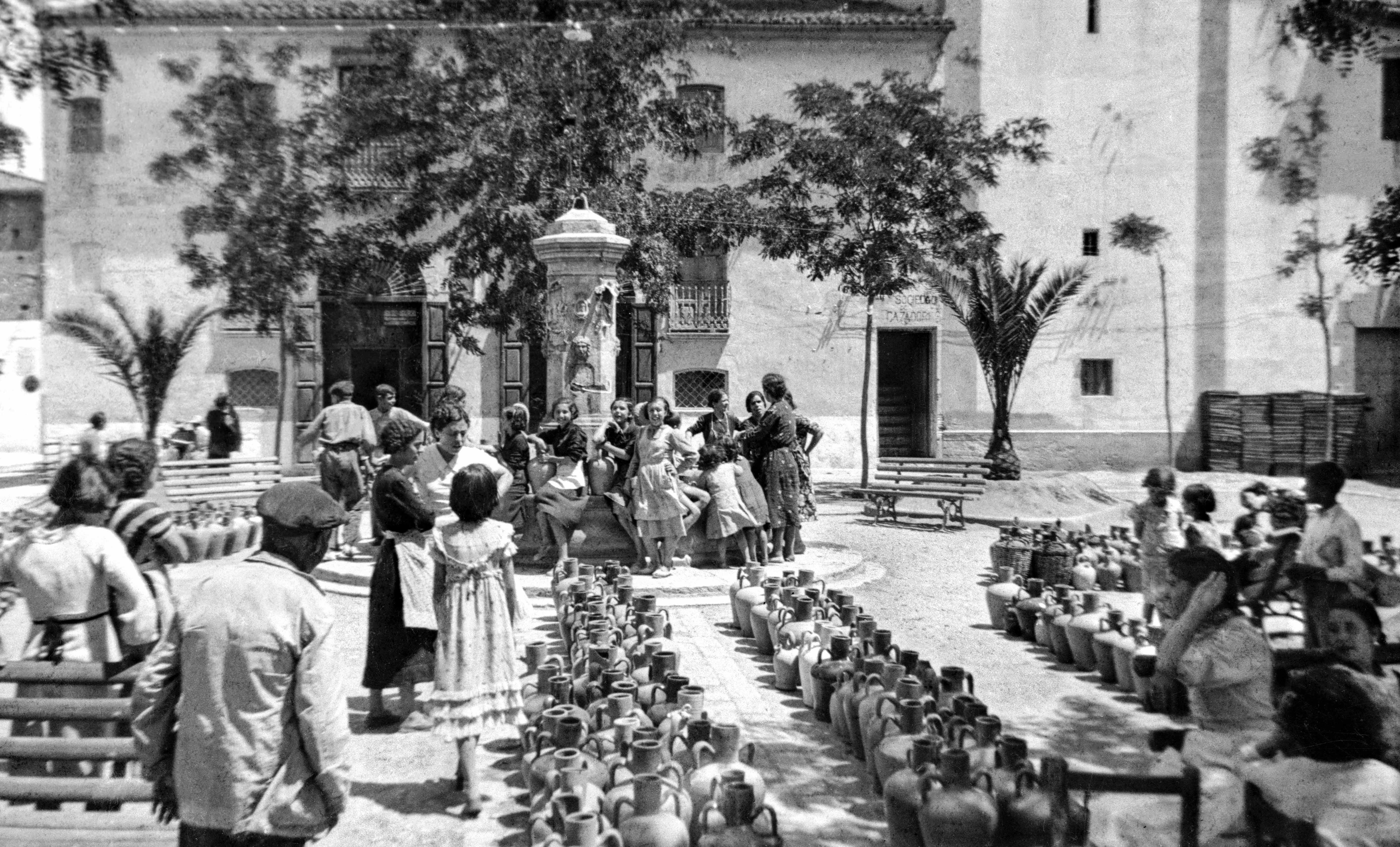 Document una mica desenfocat. L'Arxiu allibera avui aquesta imatge de la Plaça de la Font d'Alginet, feta per Ismael Latorre Mendoza el 14-06-1937, abans de complir els 17 anys. Són molts els negatius i les fotos d'aquesta plaça, actualment anomenada Plaça de la Constitució, fetes per Ismael Latorre, on la gent del poble anava a per aigua. Aquesta fotografia va estar exposada per primera vegada el 18-08-1968, a l'ajuntament d'Alginet, a la primera exposició d'Ismael Latorre. Aquesta foto va ser publicada en: Alegre, José i Segura, Jorge: Así fué y así es nuestro Alginet. Edita Ajuntament d'Alginet, any 1972. Dipòsit Legal: V 4239-10/1972; pàgina 68. Alginet Butlletí Informatiu, Any 18, núm 54, 1er semestre 1993. Edita Ajuntament d'Alginet. Dipòsit Legal V. 3087-76. Fornés, Alberto; Císcar, José i Latorre, Ismael: Alginet, històries, costums i altres relats, Societat Cultural Alèdua, Alginet, 2003. Dipòsit Legal: V-2546-2003; pàgina 1. Nogués, Josep. Centenari de la Comunitat de Regants. Séquia d'Alèdua d'Alginet. Ajuntament d'Alginet i Comunitat de Regants Séquia d'Alèdua, setembre 2014 ISBN 978-84-697-0854-5, pàgina 177. Tractament digital: Carolina Latorre Canet.